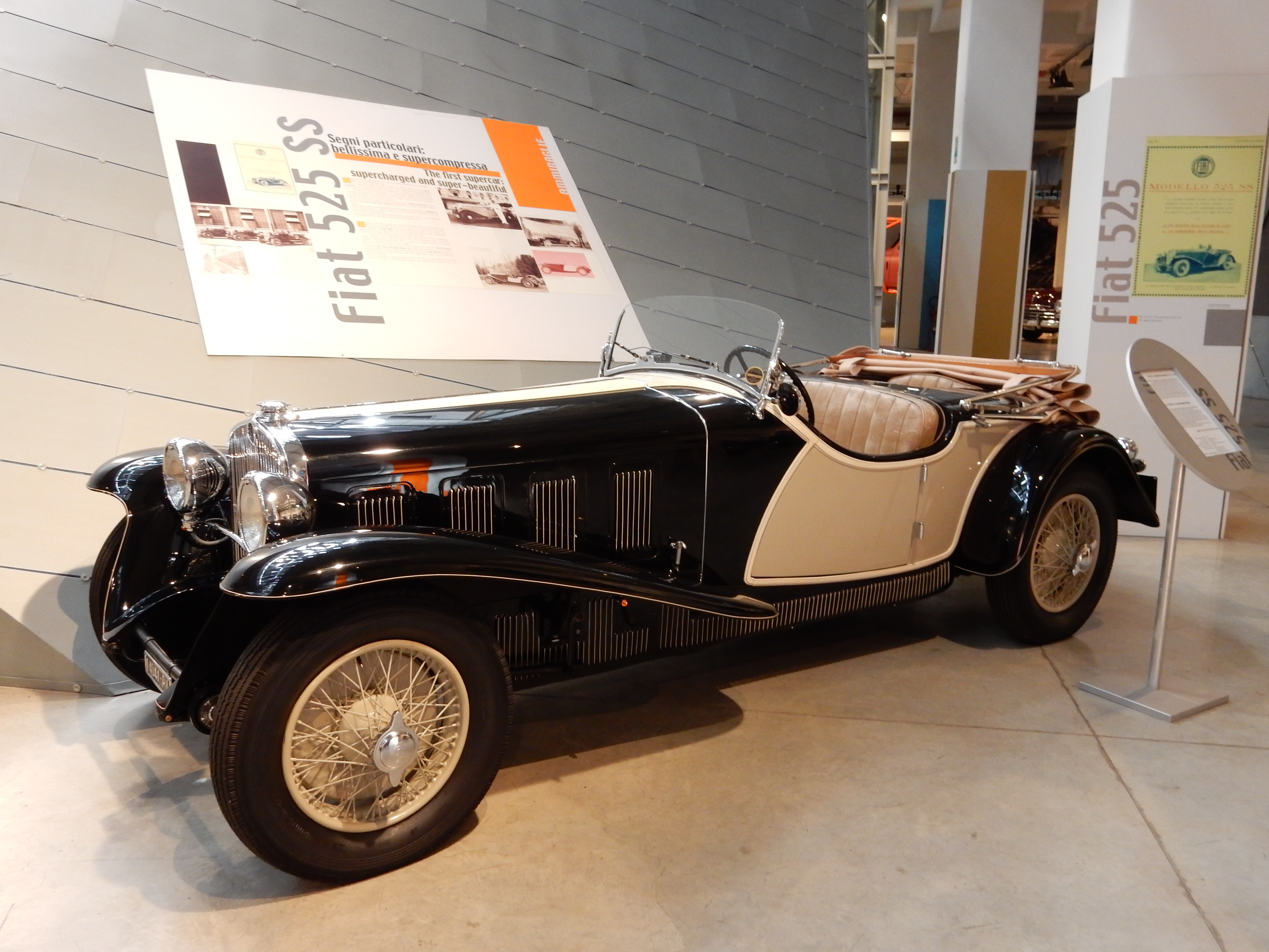 FIAT 525 SS al Centro Storico FIAT